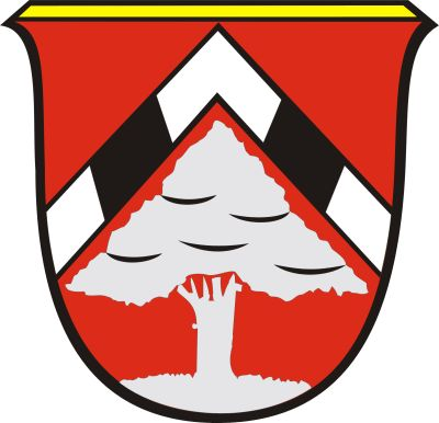 Wappen von Faistenau